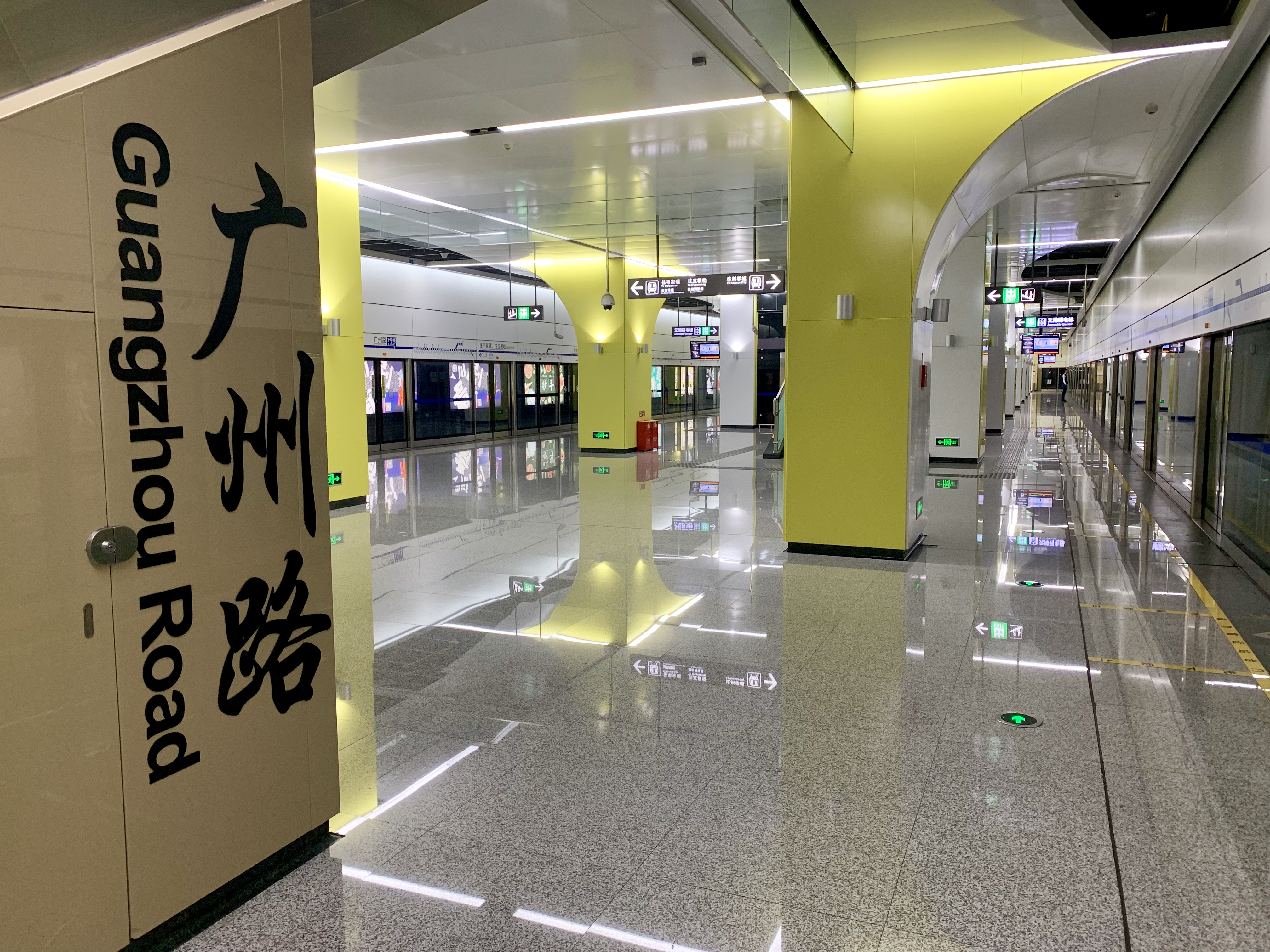 成都地铁广州路站